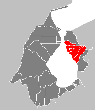 Ubicación del Distrito Bolívar.